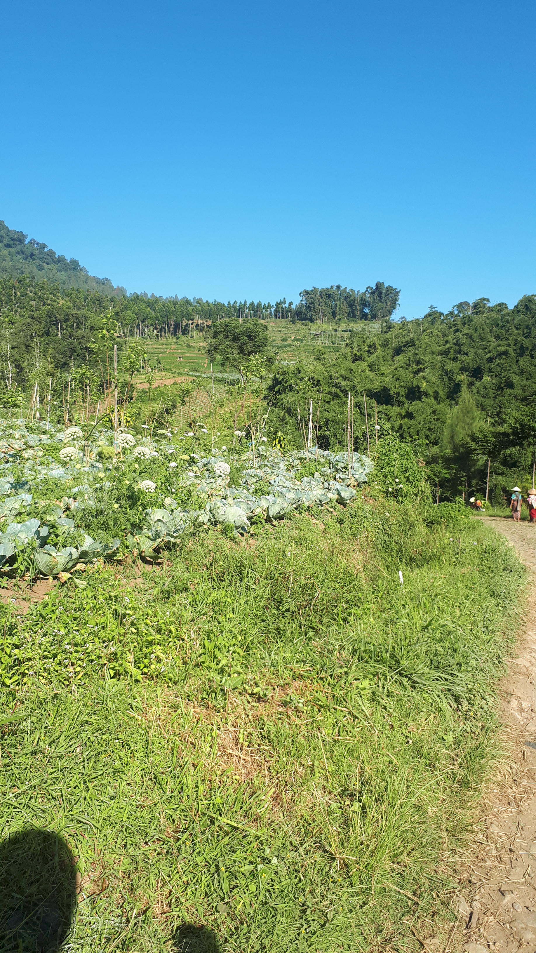 Perkebunan Desa Ngabab